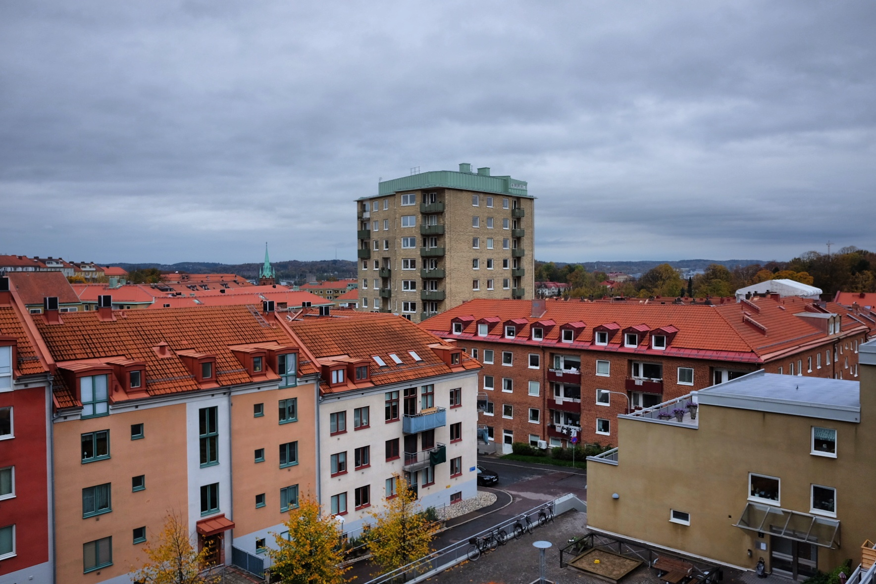 Punkthus, Göteborg. Torkelgatan 4.